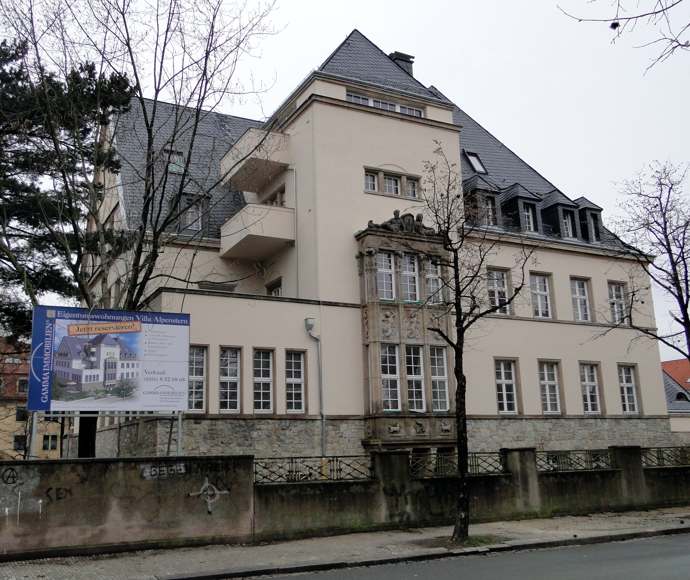 Mietvilla Wilder-Mann-Straße 29 in Dresden-Trachau